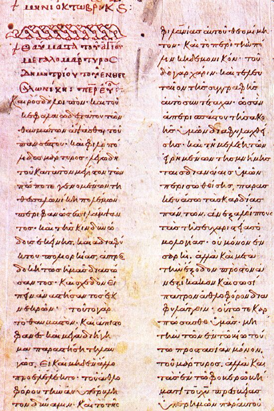 Vat. gr. 797, p. 292